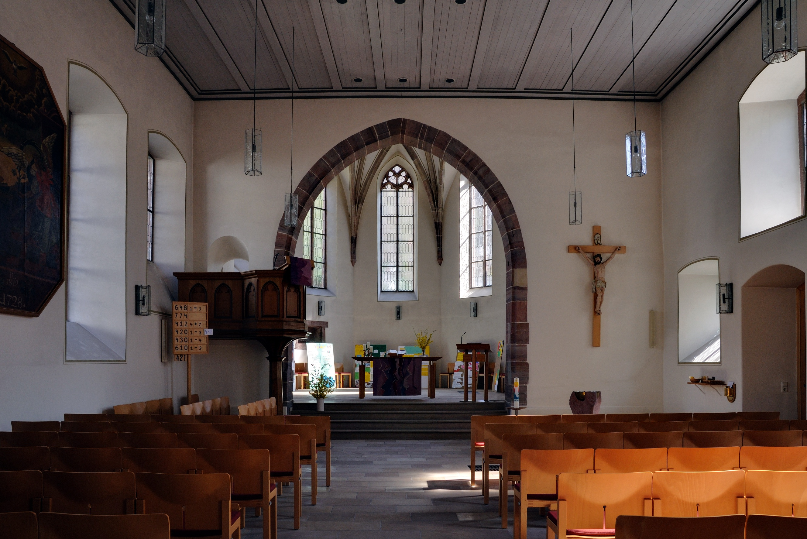 Grenzach-Wyhlen: St. Leodegar, Langhaus mit Blickrichtung zum Chor